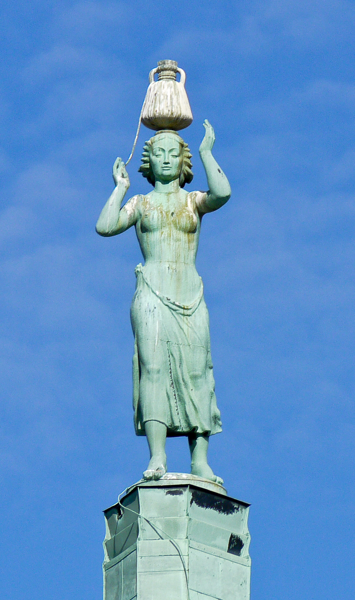 Vattenbärerskan, staty av Gustaf Sandberg. Placering: Kvarteret Blästern 13, på tidigare kyltornet till Apotekarnes Mineralvattenfabrik, Hälsingegatan/Norra Stationsgatan, Stockholm.